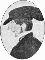 Lars Tidén (1775-1847), svensk läkare